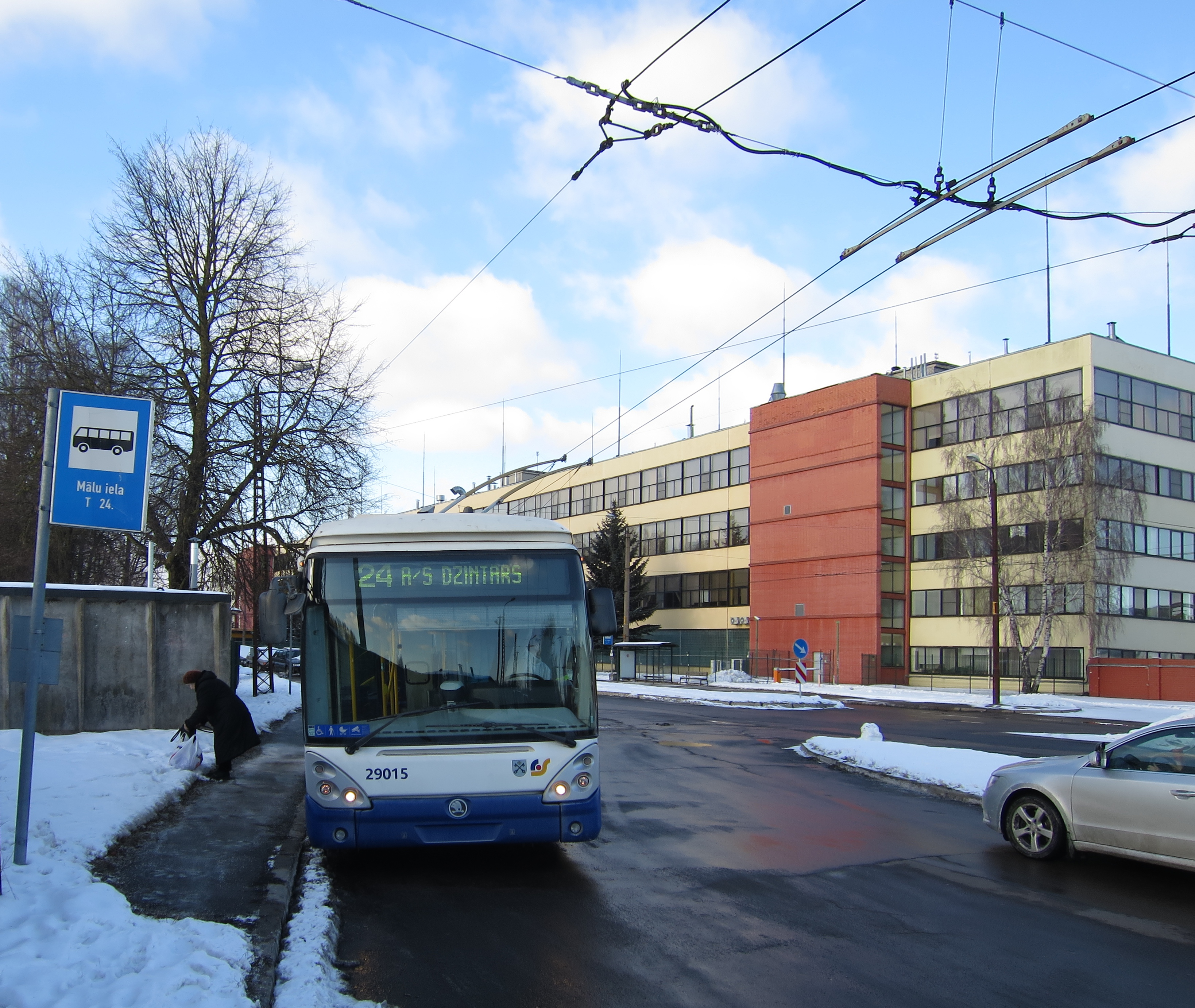 24. trolejbuss Mālu ielas galapunktā